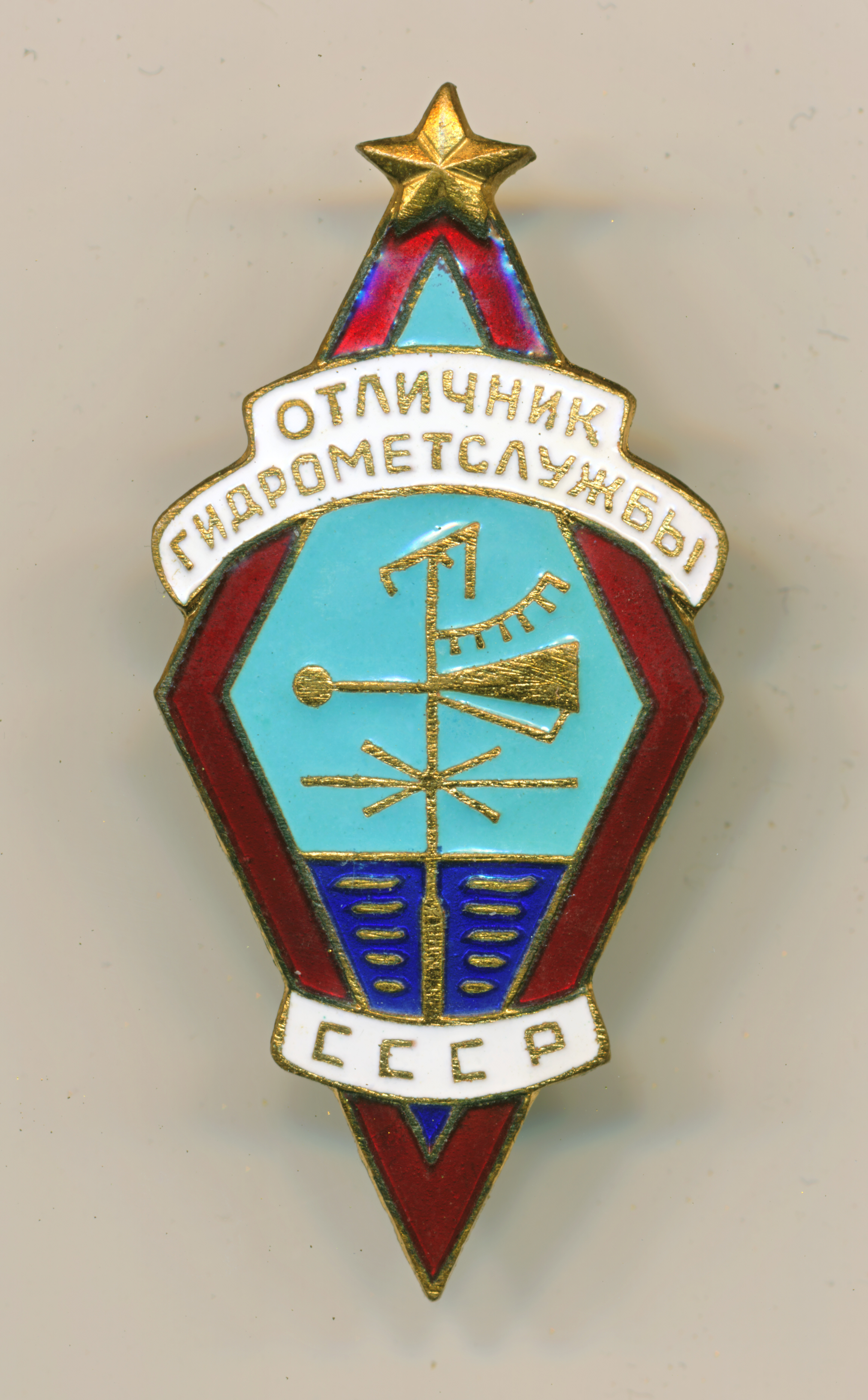 Знак "Отличник гидрометслужбы СССР" № 1534, вручённый Е. М. Добрышману (1919-2016)